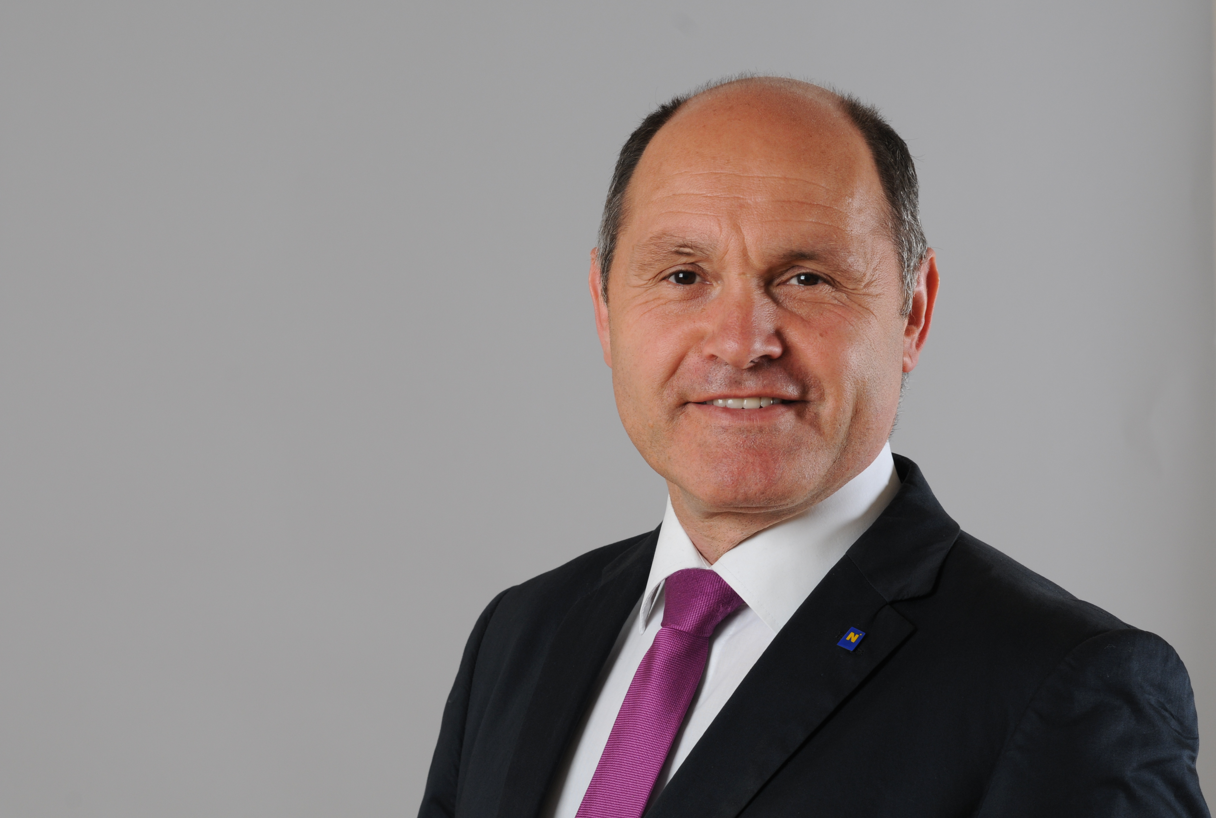 Wolfgang Sobotka. Landesrat und Landeshauptmannstellvertreter in Niederösterreich.